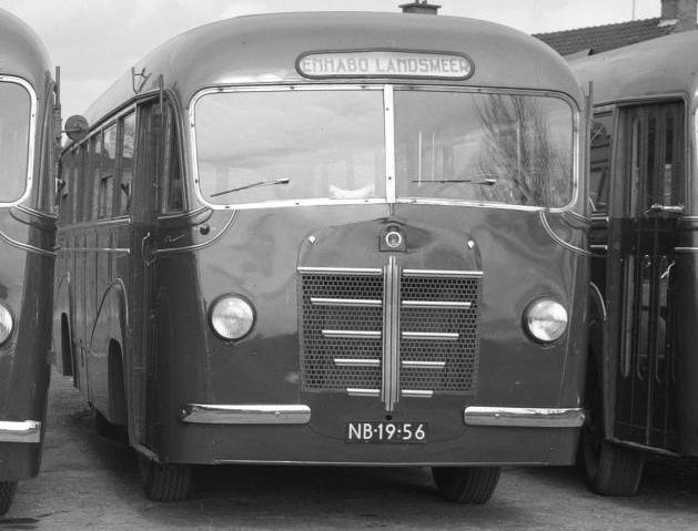 NB-19-56